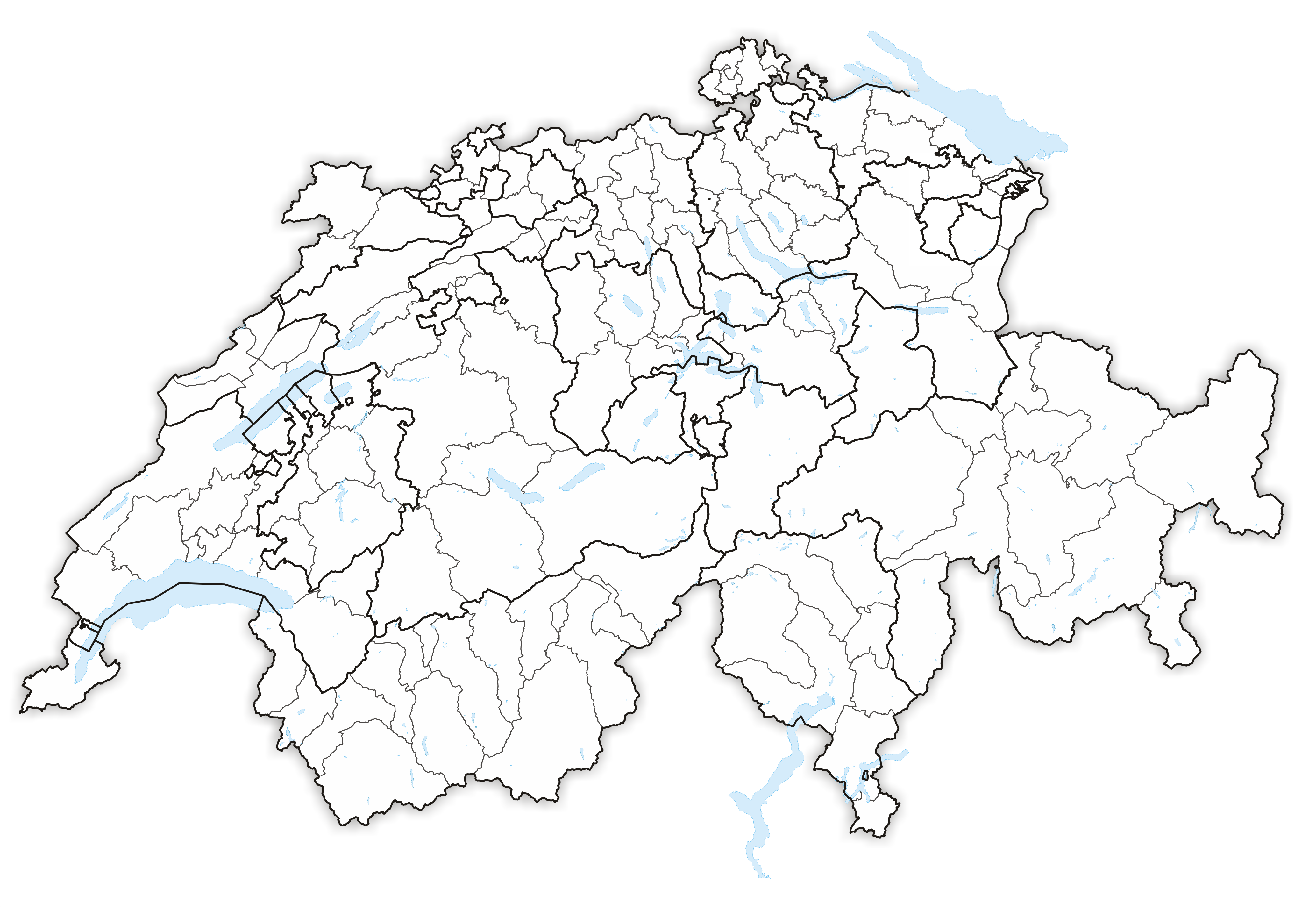 Districts in Switzerland